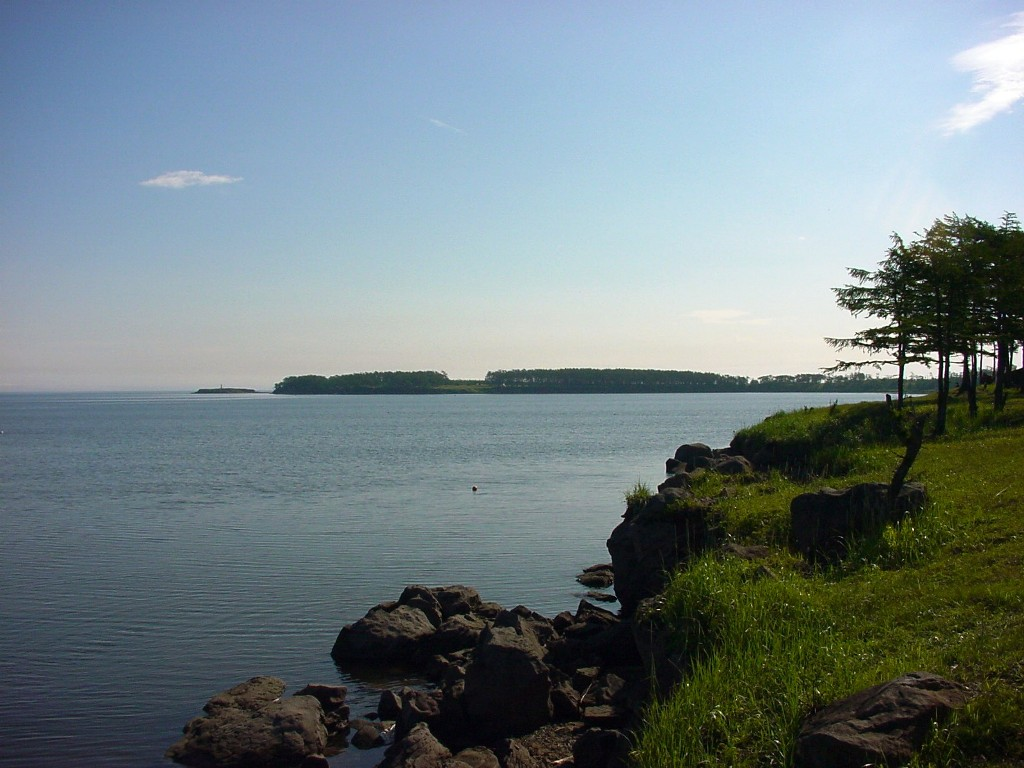 Татарский пролив